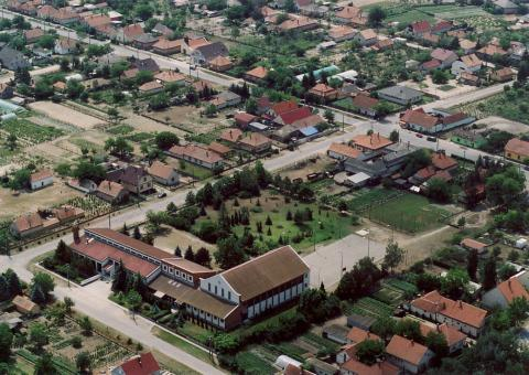 Jakabszállás, Hungary, aerialphotography